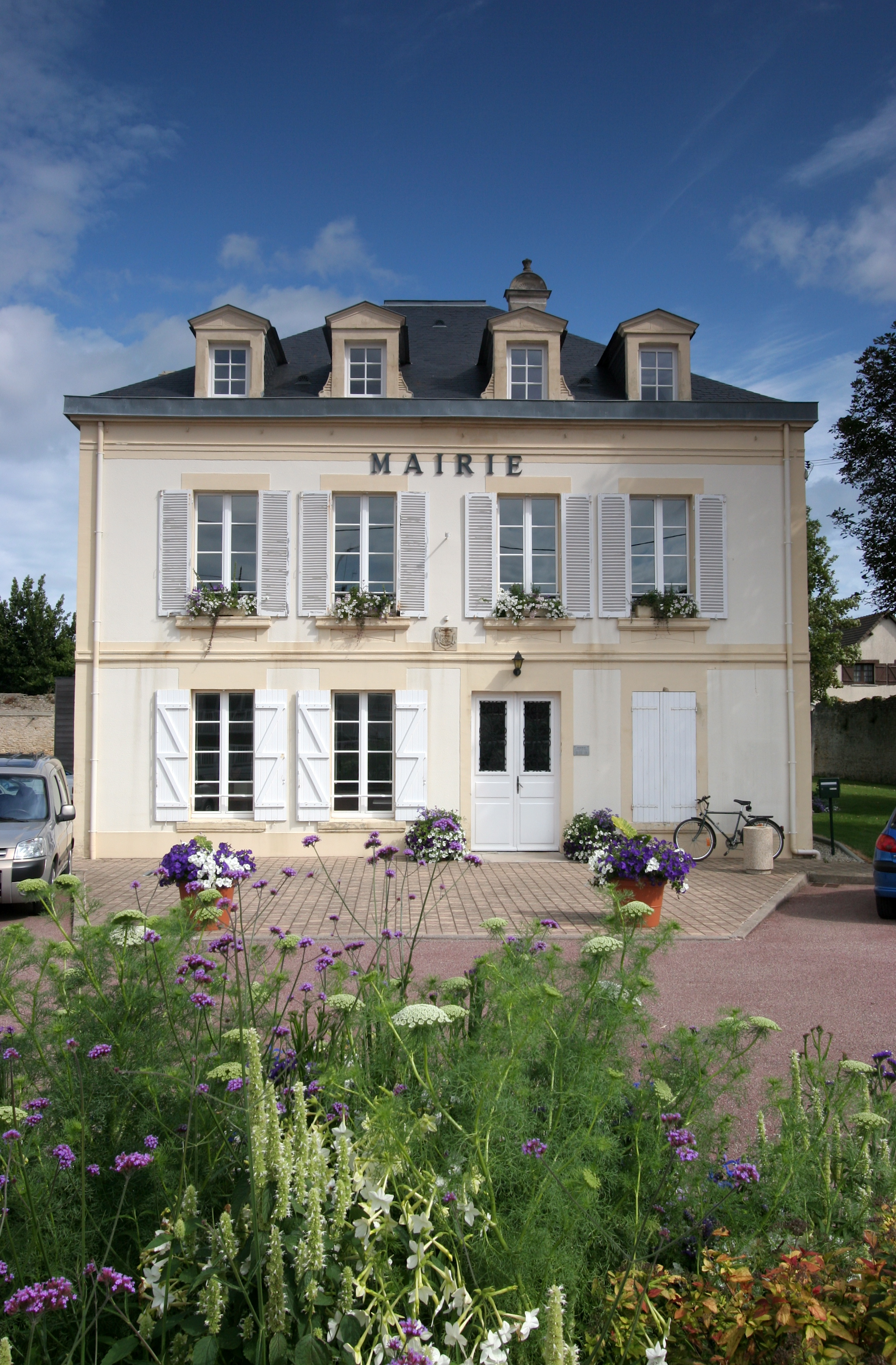 Mairie de Bernières sur Mer, Calvados, France